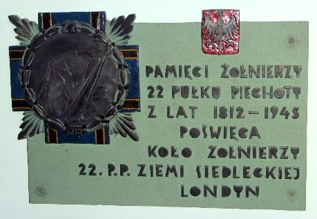 Tablica w kościele św. Andrzeja Boboli w Londynie